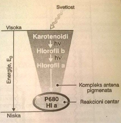 Ekscitoni se prenose sa jednog molekula na drugi, uvek u pravcu pigmenta koji apsorbuje manju energiju.